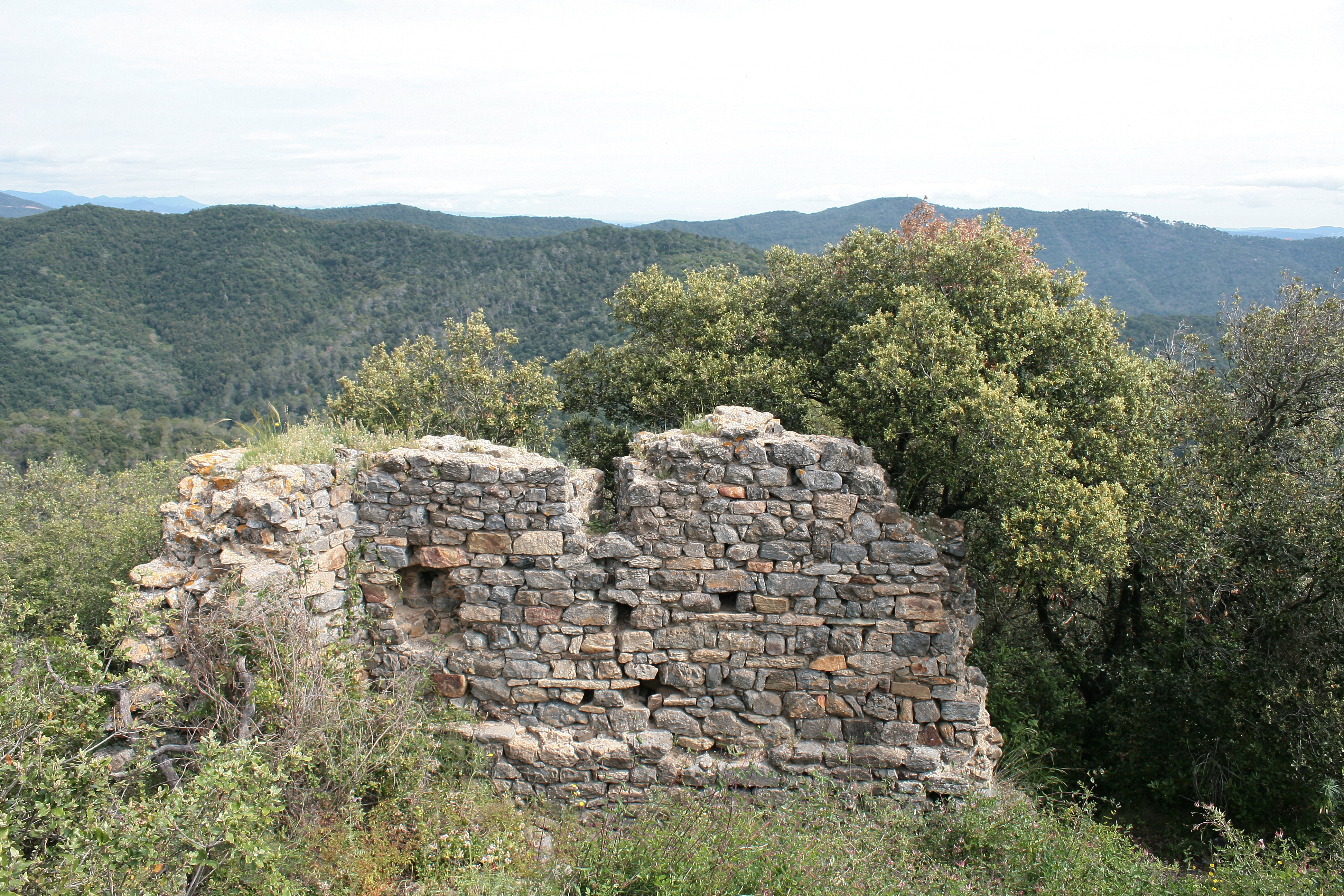 Château de Montpalau, restes du donjon.